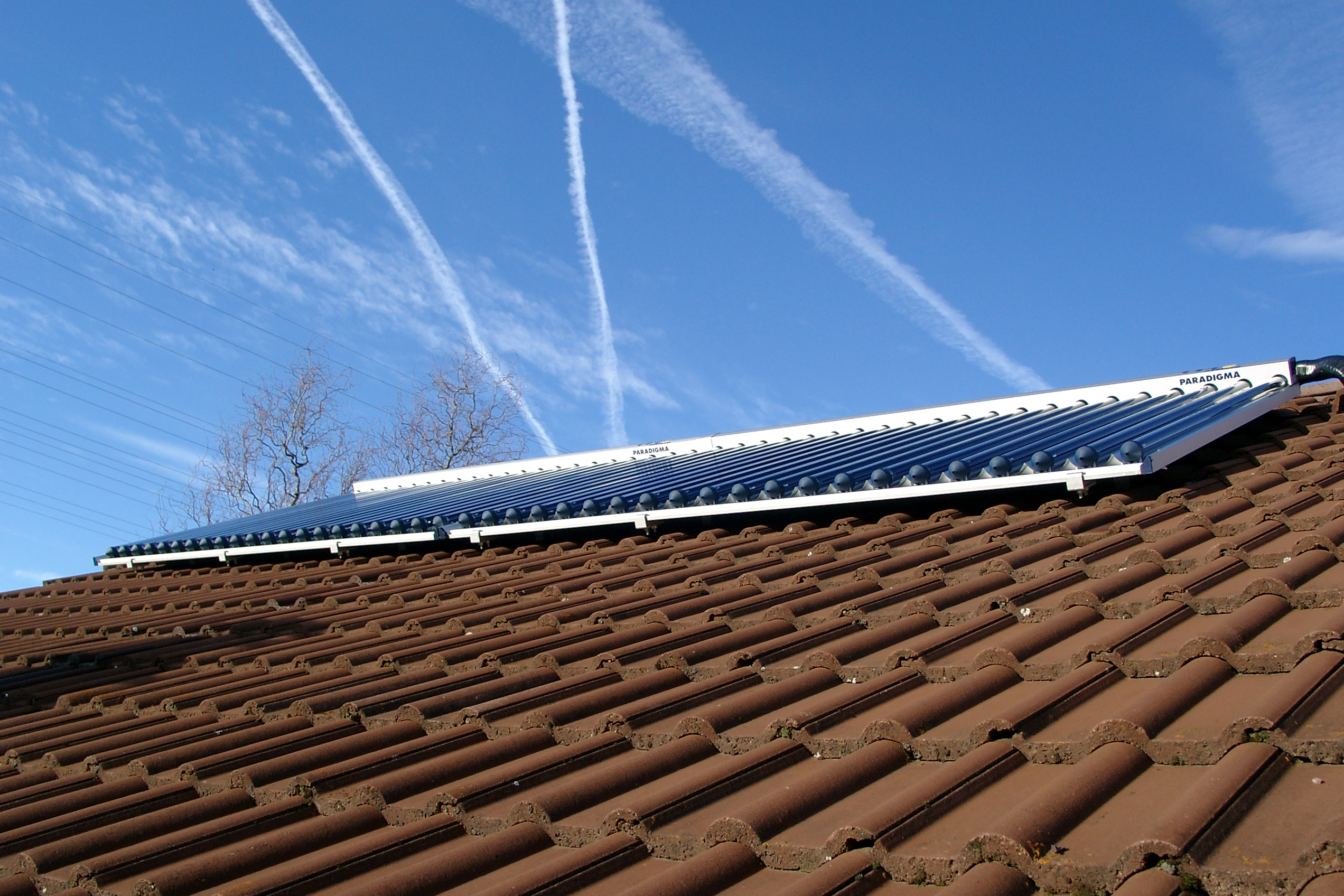 Vakuumröhrenkollektor